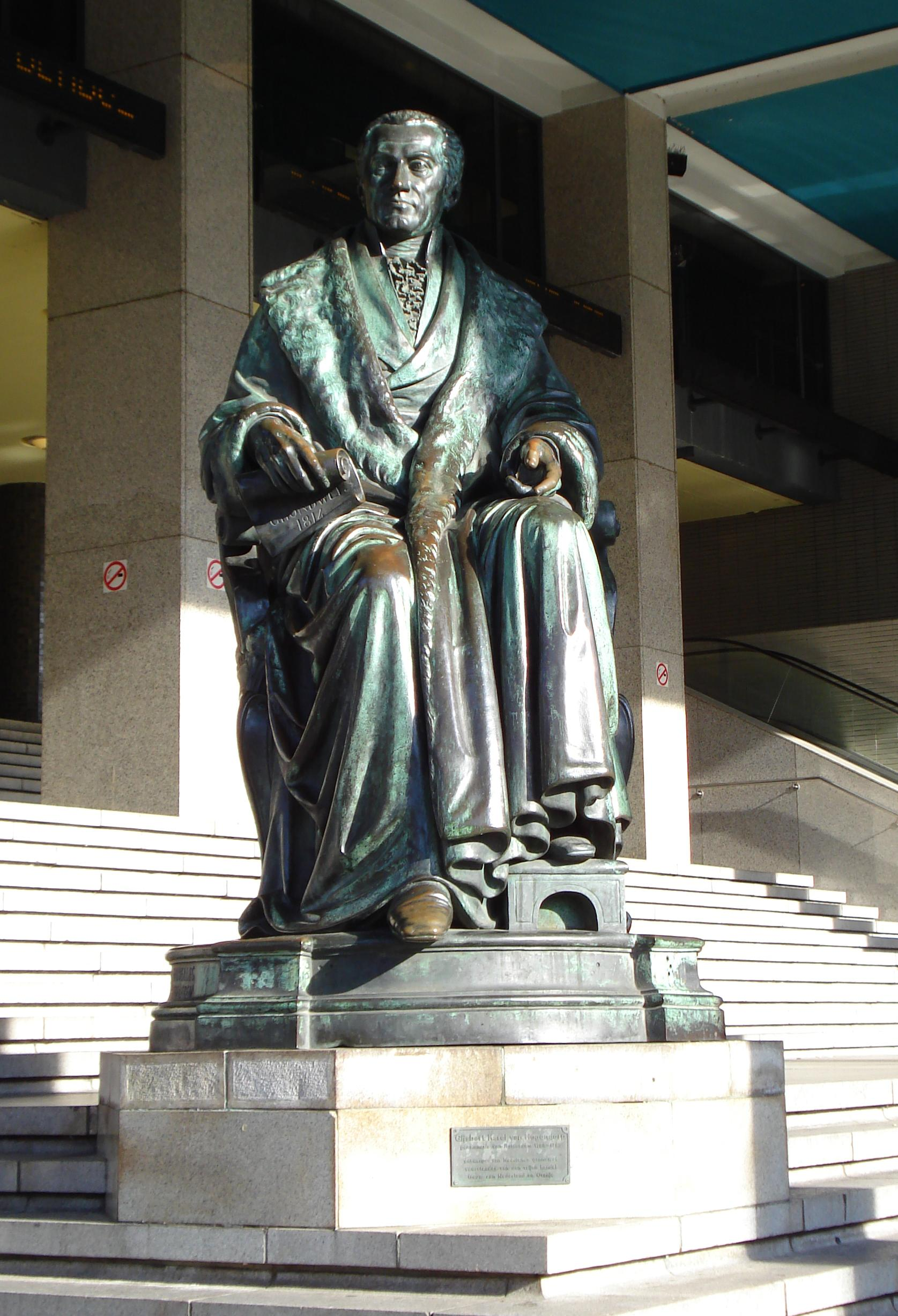 Rotterdam, Coolsingel. Kunstwerk "Gijsbert Karel van Hogendorp" van Jozef Geefs. Rotterdam/The Netherlands.